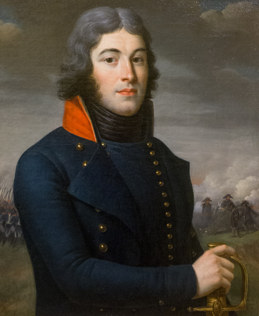 "Portrait de Lazare Hoche (1768-1797)"